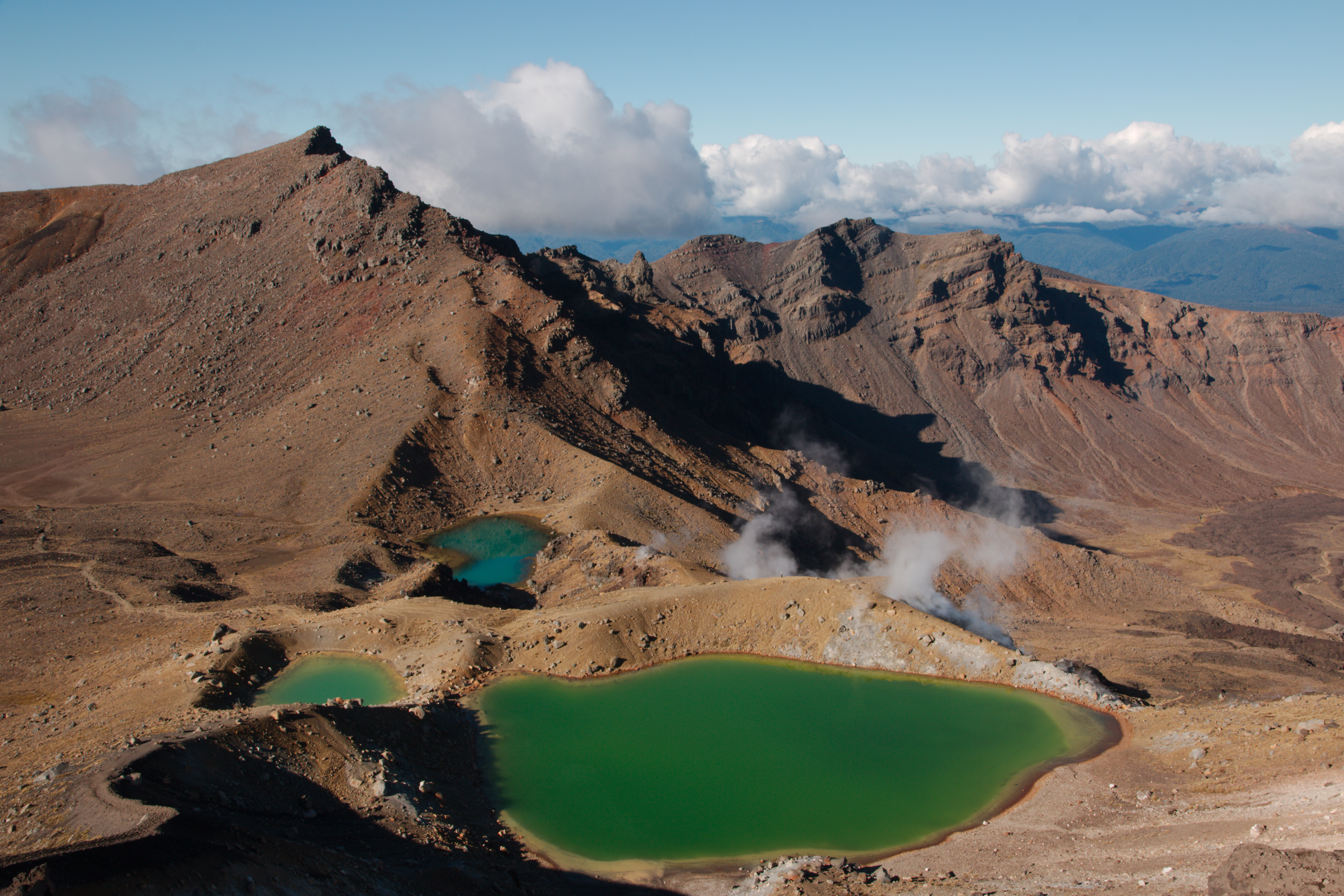 Tongariro National Park